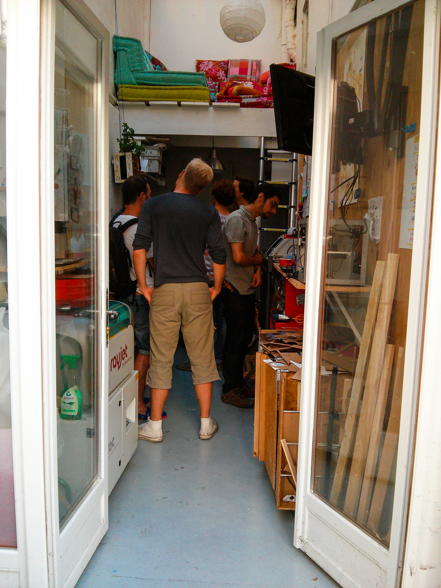 Le Petit FabLab de Paris, 156 rue Oberkampf, 75011 Paris.